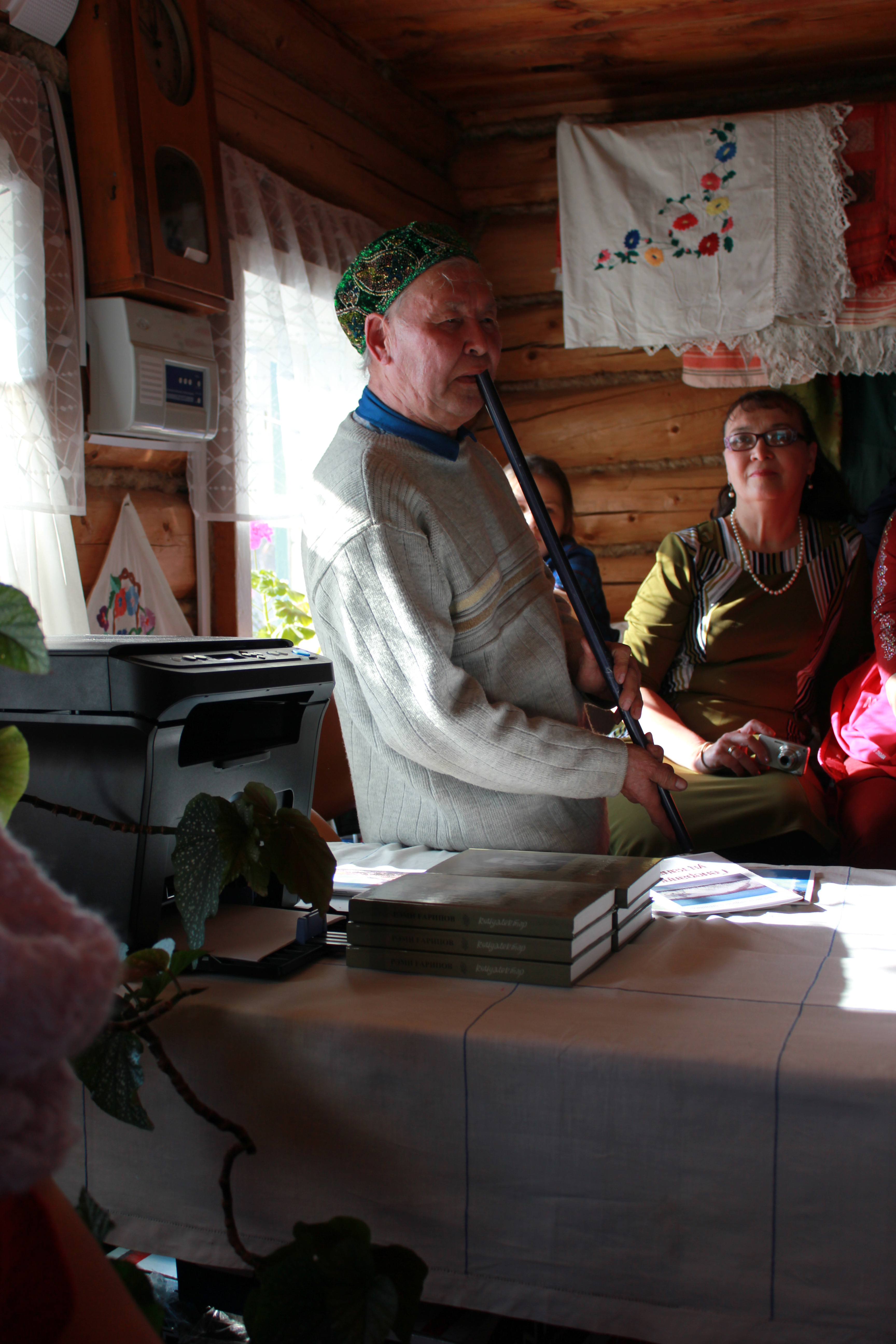 Башҡортса: Рәми Ғариповтың йорт-музейы. Башҡортостан Республикаһы, Салауат районы, Арҡауыл ауылы, Р. Ғарипов урамы, 60